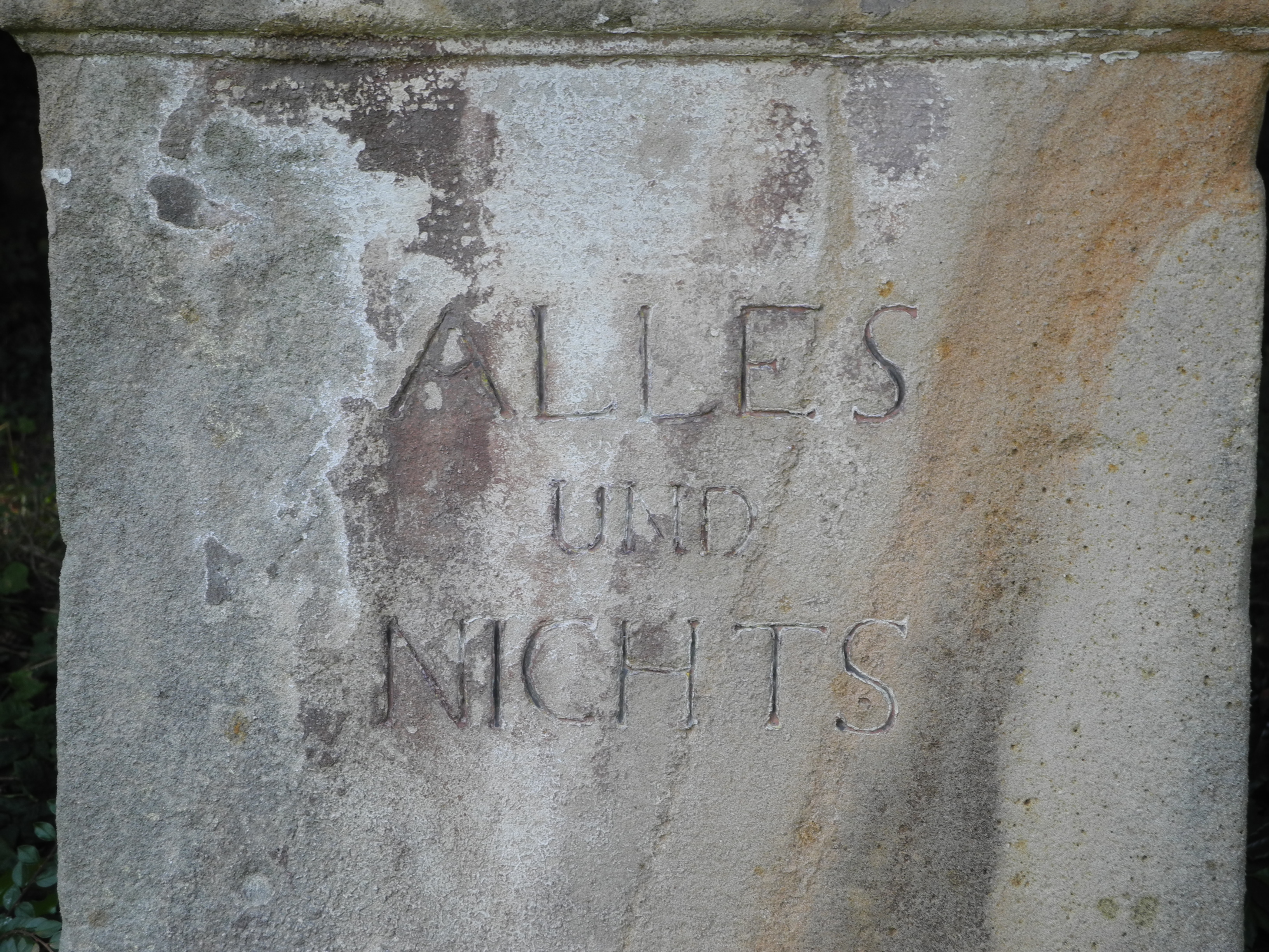 Alles und Nichts - Schlosspark Riede, Hessen, Deutschland.